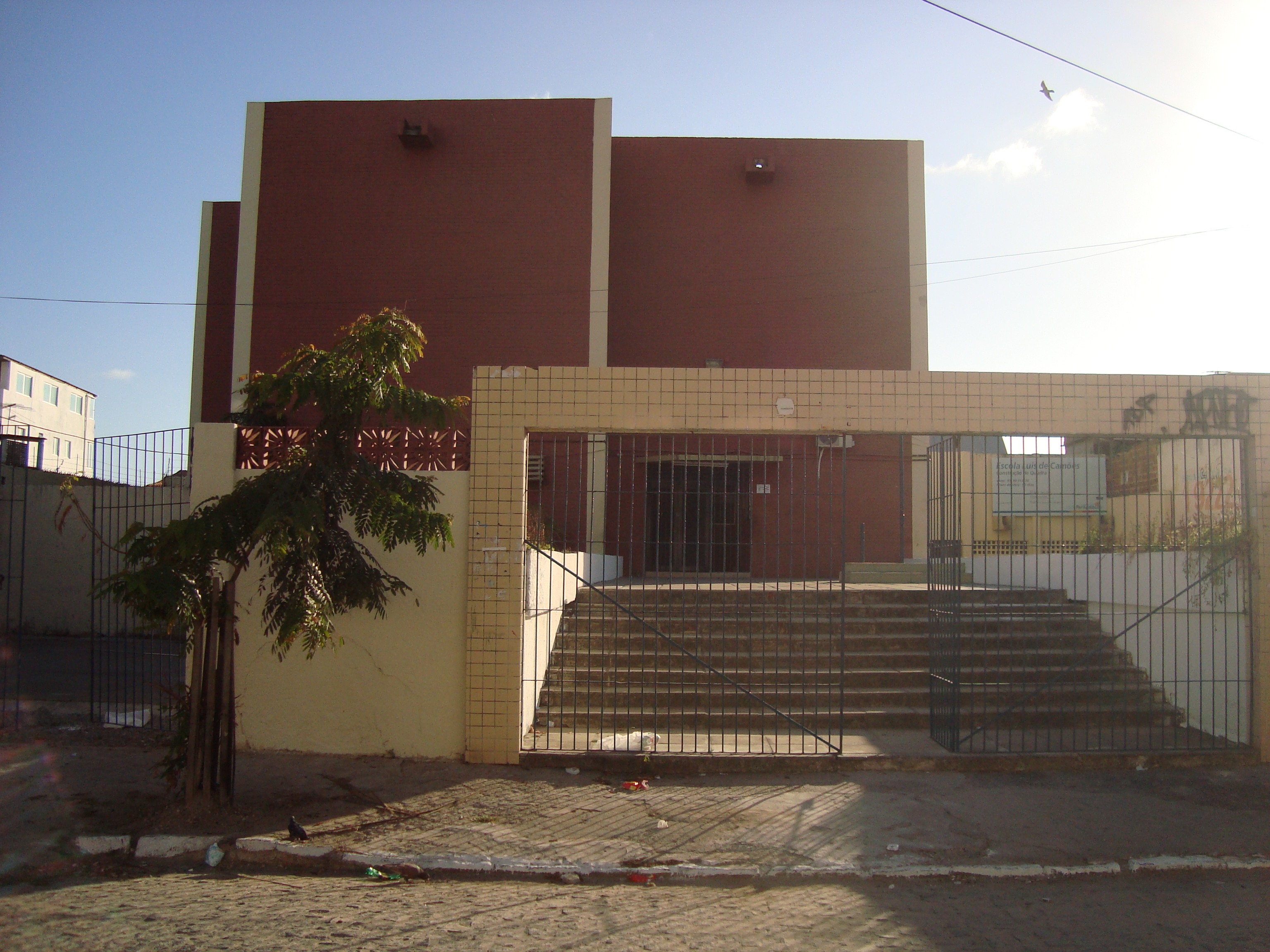 Vista Lateral da Escola Estadual Luís de Camões, situada à Rua Doutor Henrique Lins, s/nº Brasília Teimosa, Recife-PE